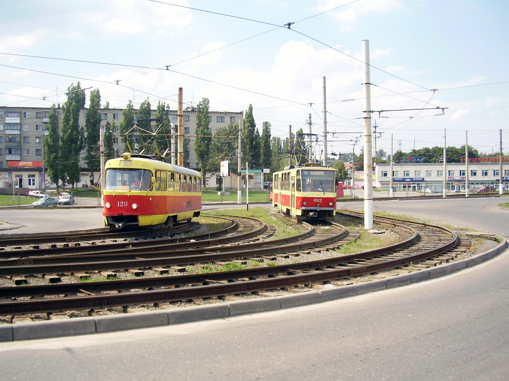 Подъем с улицы Энгельса на улицу Сумскую